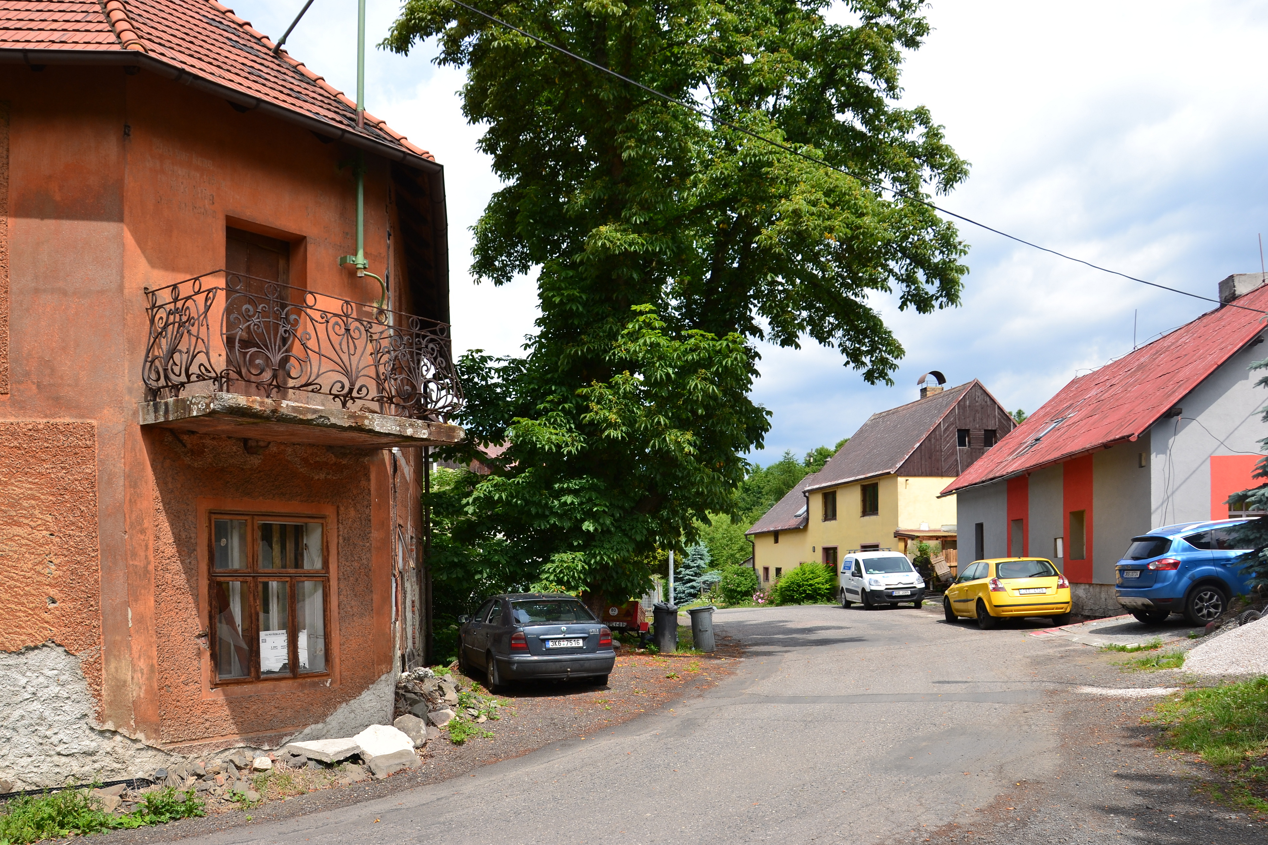 Korunní - střed vesnice